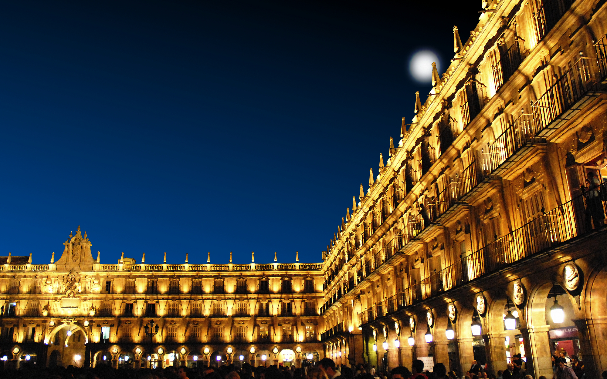 D'Plaza Mayor vu Salamanca owes am Hierscht